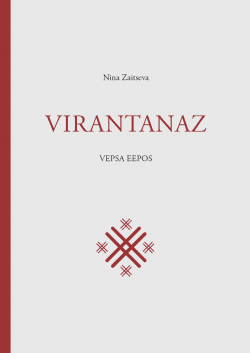 Nina Zaitseva. Virantanaz: vepsa eepos Tõlkinud, kommenteerinud ja saatesõna kirjutanud Madis Arukask Esikaas